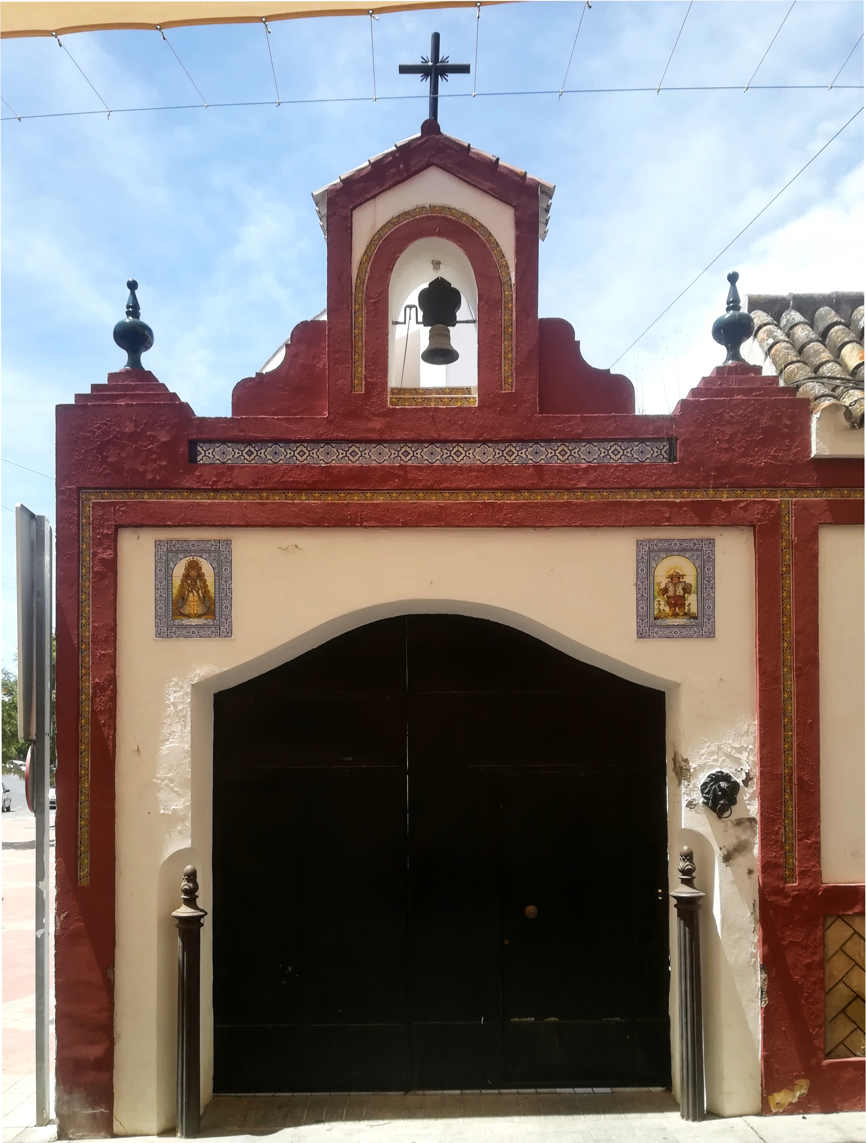 Capilla de la Hermandad del Rocío de Tomares, provincia de Sevilla, Andalucía, España.